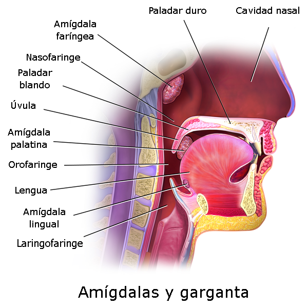 Anatomía de la boca y faringe con rótulos que indican la posición de la amígdala palatina, amígdala lingual y amígdala faríngea